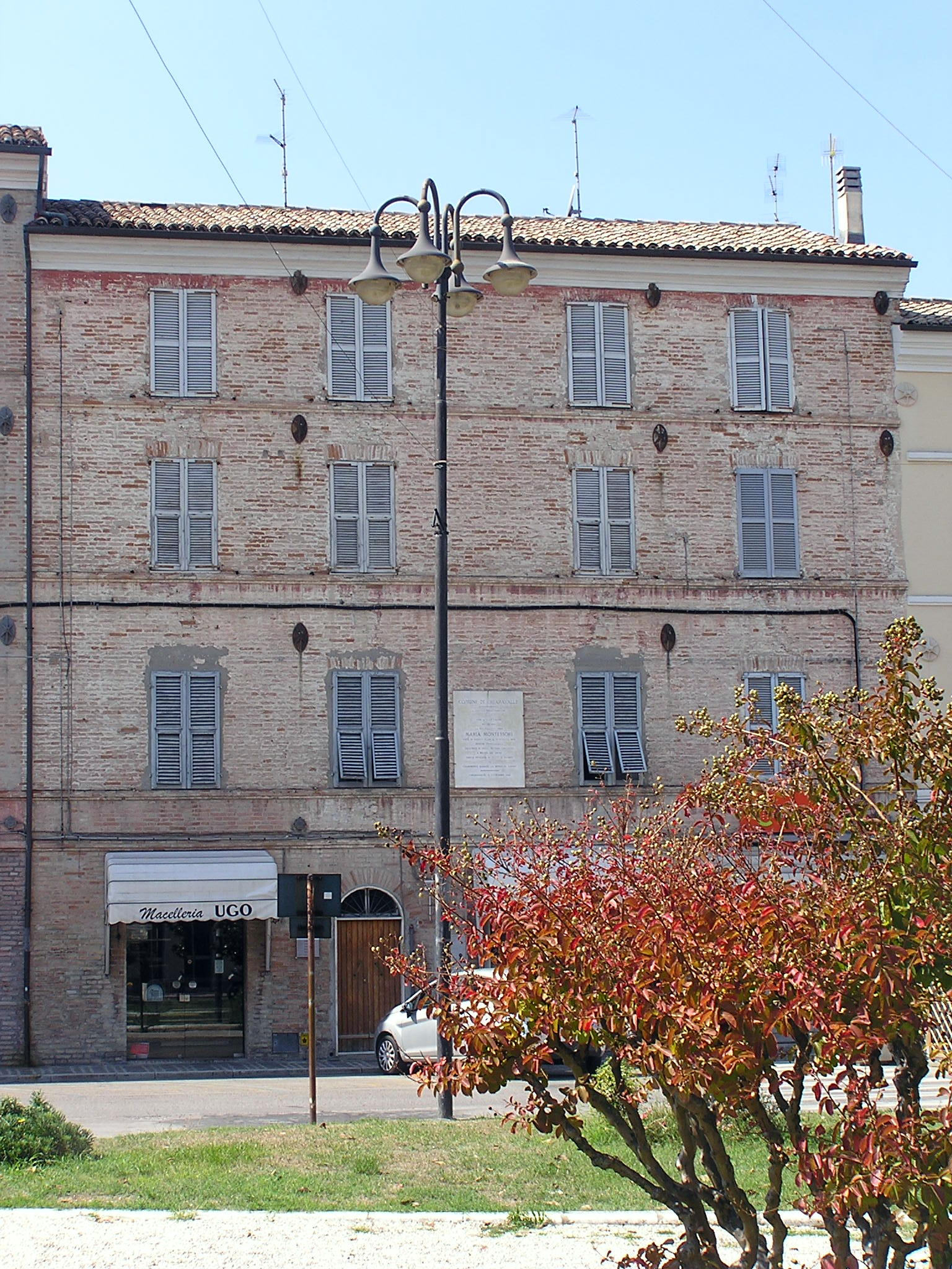 La foto rappresenta la casa natale della celebre educatrice e pedagogista Maria Montessori, nata a Chiaravalle, nei pressi di Ancona, il 31 agosto 1870.